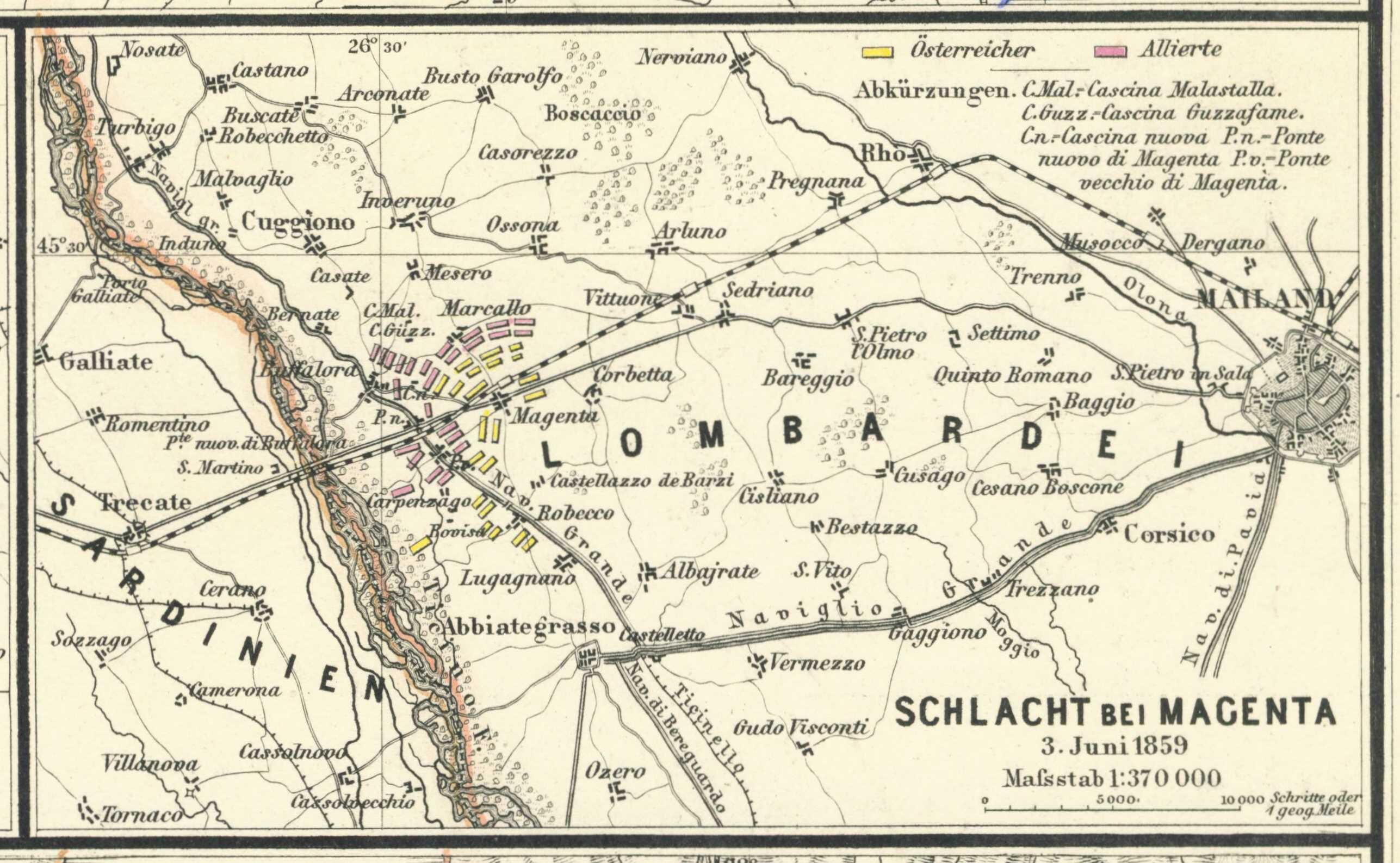 Schlacht bei Magenta 3. Juni 1859